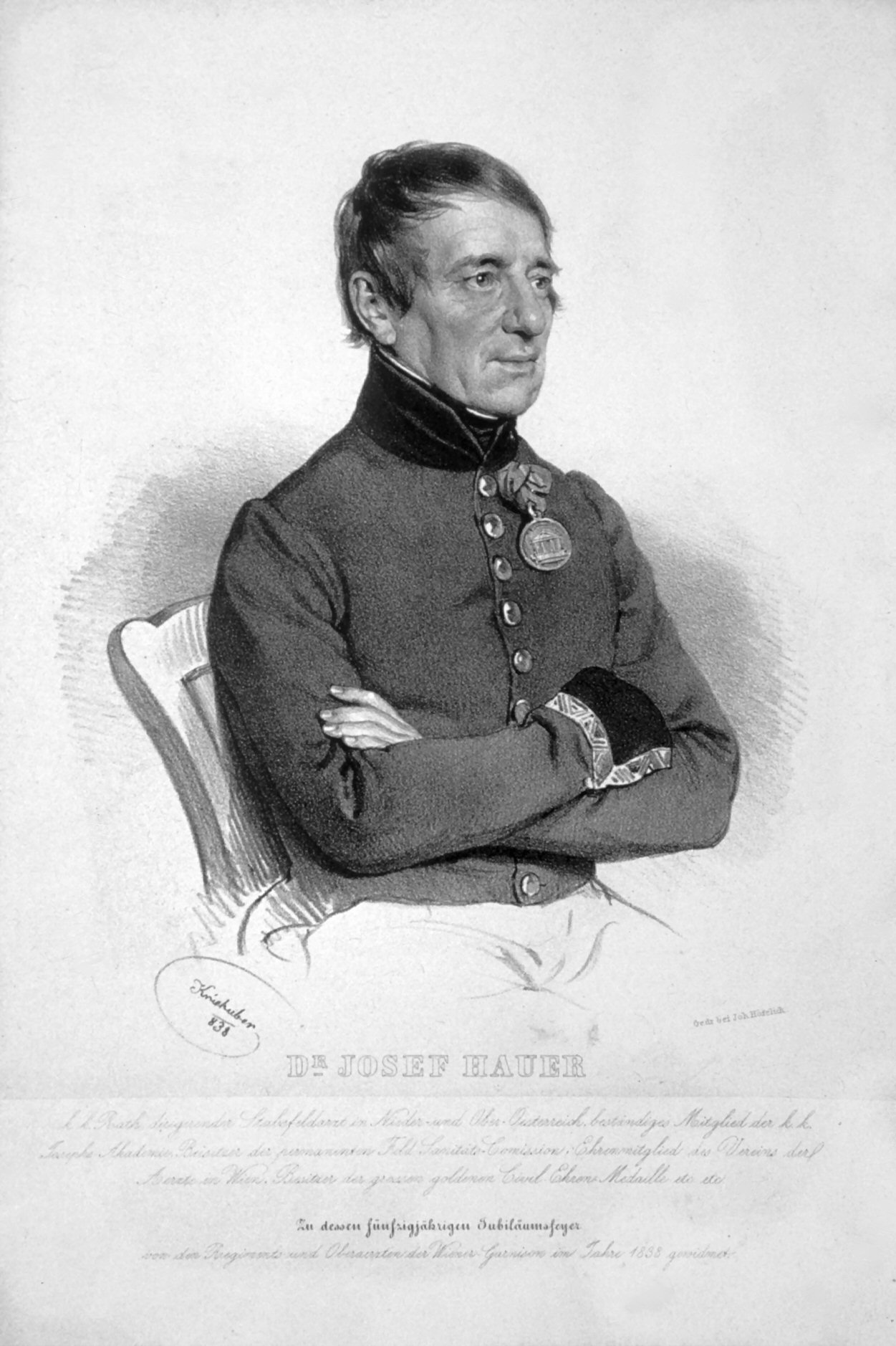 Josef Hauer (1769-1848), Stabsarzt.